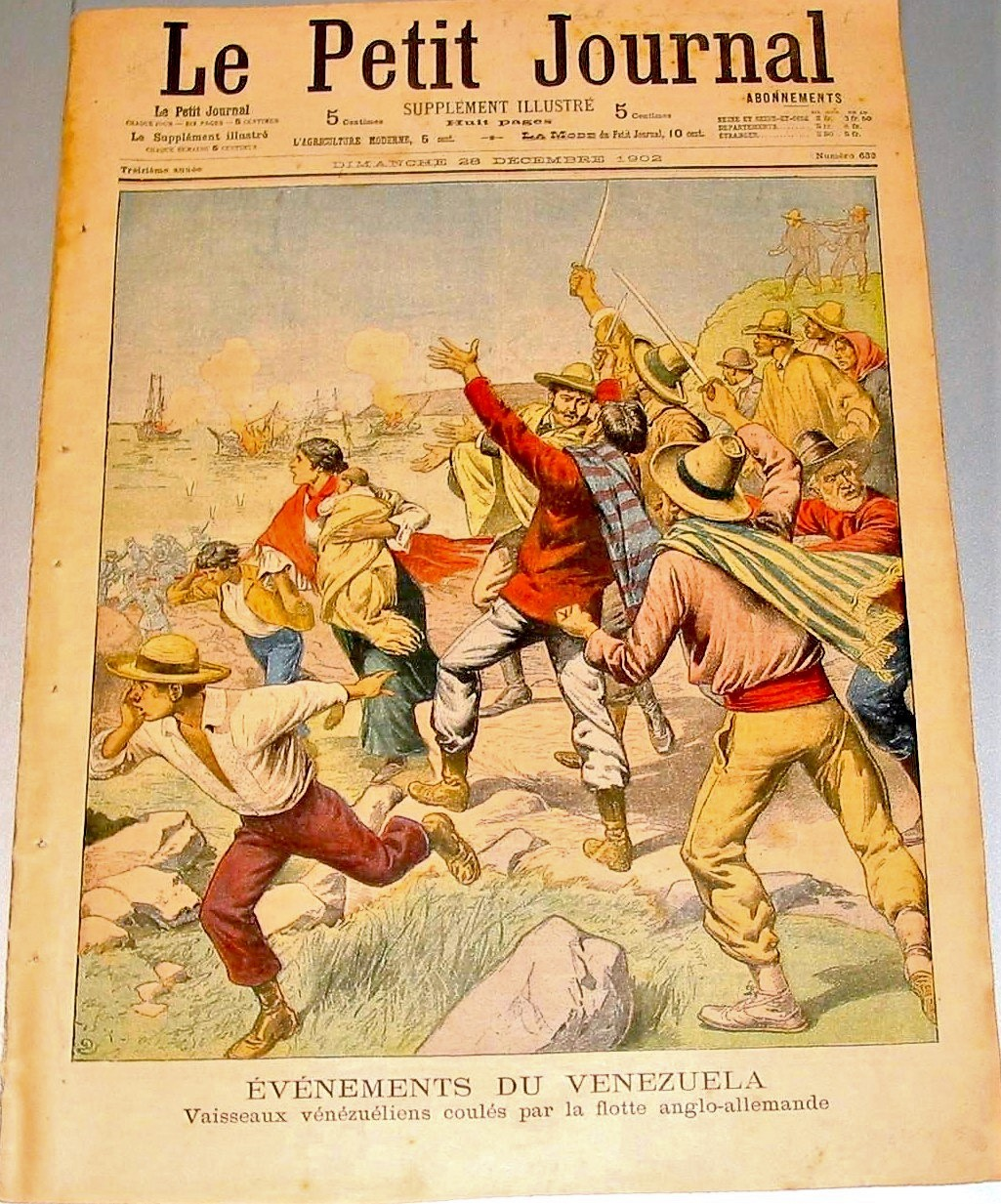 Le Petite Journal del 28 de diciembre de 1902 Portada de revista francesa sobre el embargo a Venezuela durante el gobierno de Cipriano Castro.